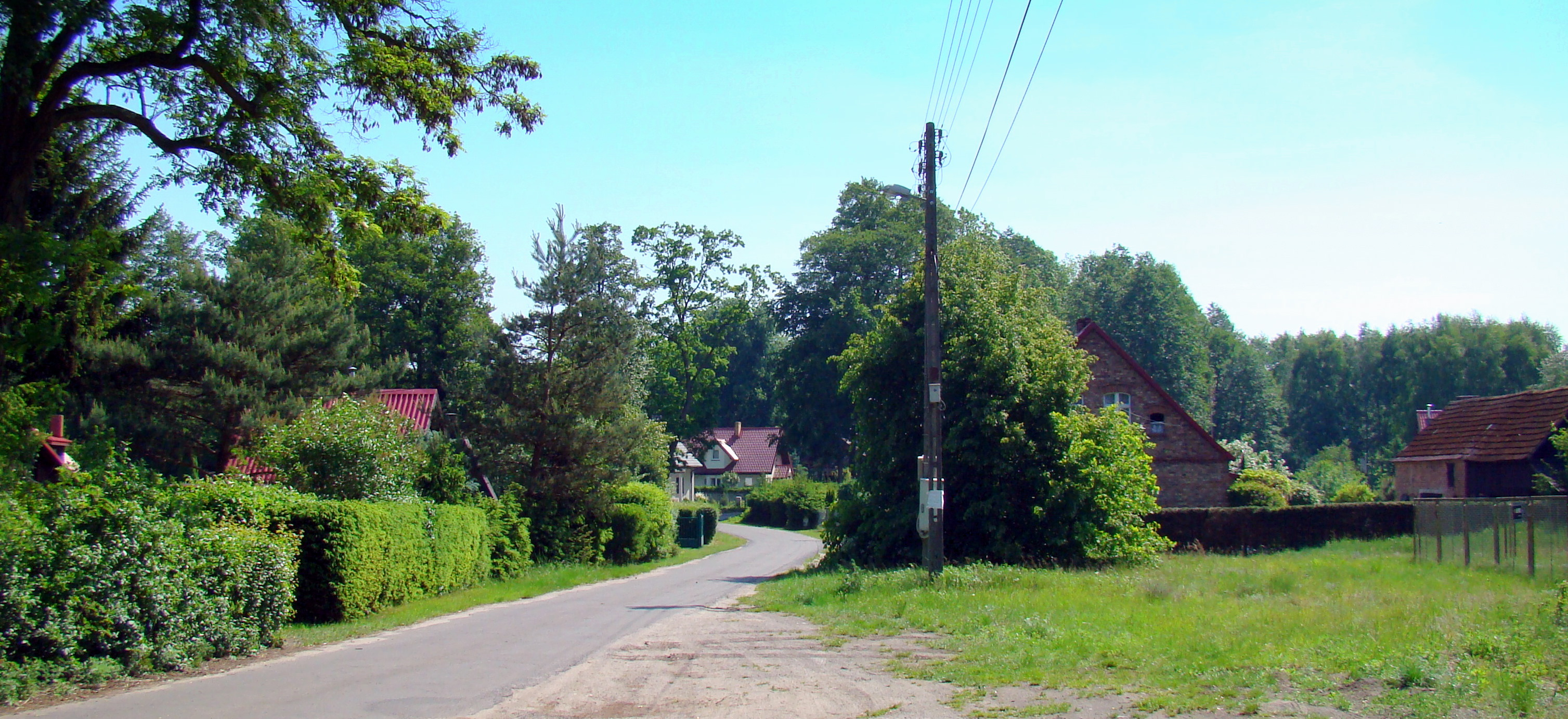 Myślibórz Wielki (Gmina Nowe Warpno, Województwo zachodniopomorskie), Polska